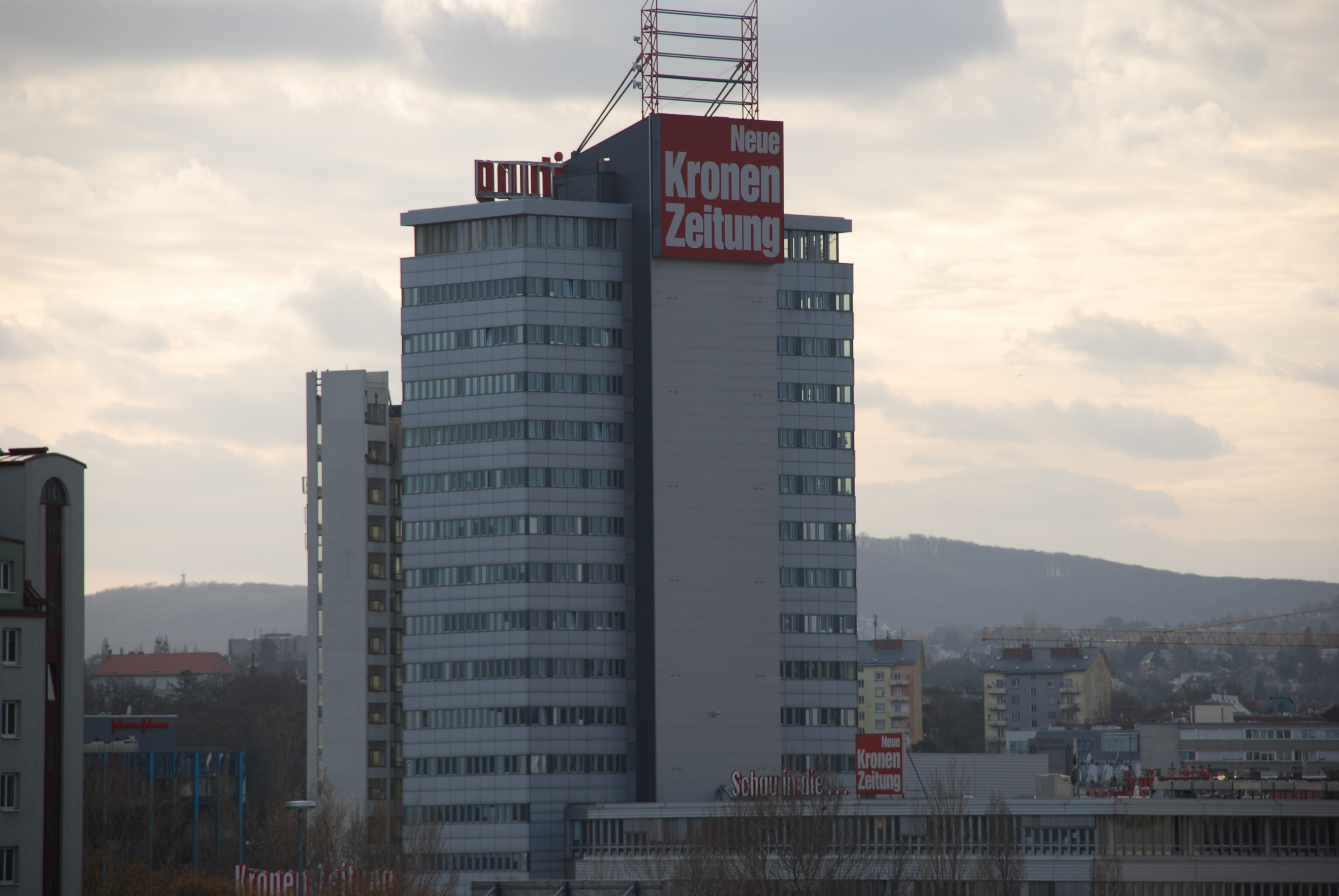 Redaktionsgebäude in der Muthgasse im 19. Bezirk in Wien